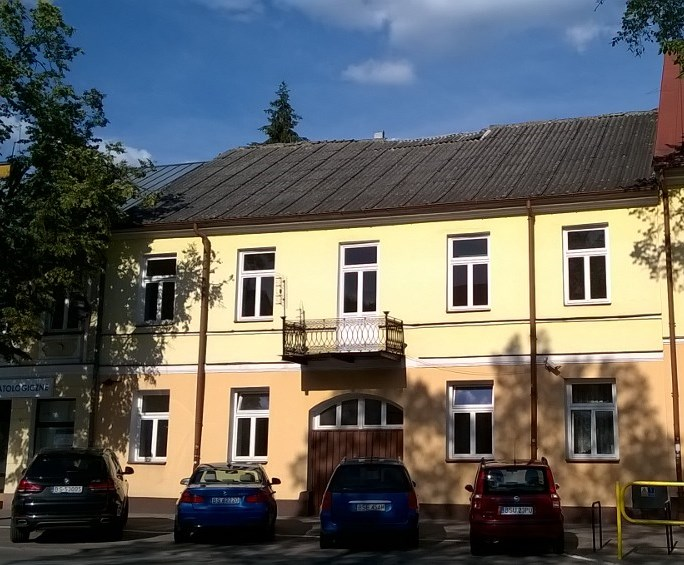 Suwałki. Dom przy ul. Kościuszki 38, w którym mieszkał Aleksander Osipowicz